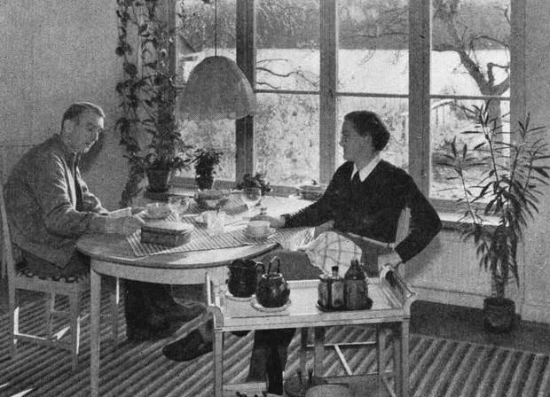 Arkitekt Sven Ivar Linds egen villa i Kevinge (Lind med hustru i matsalen)